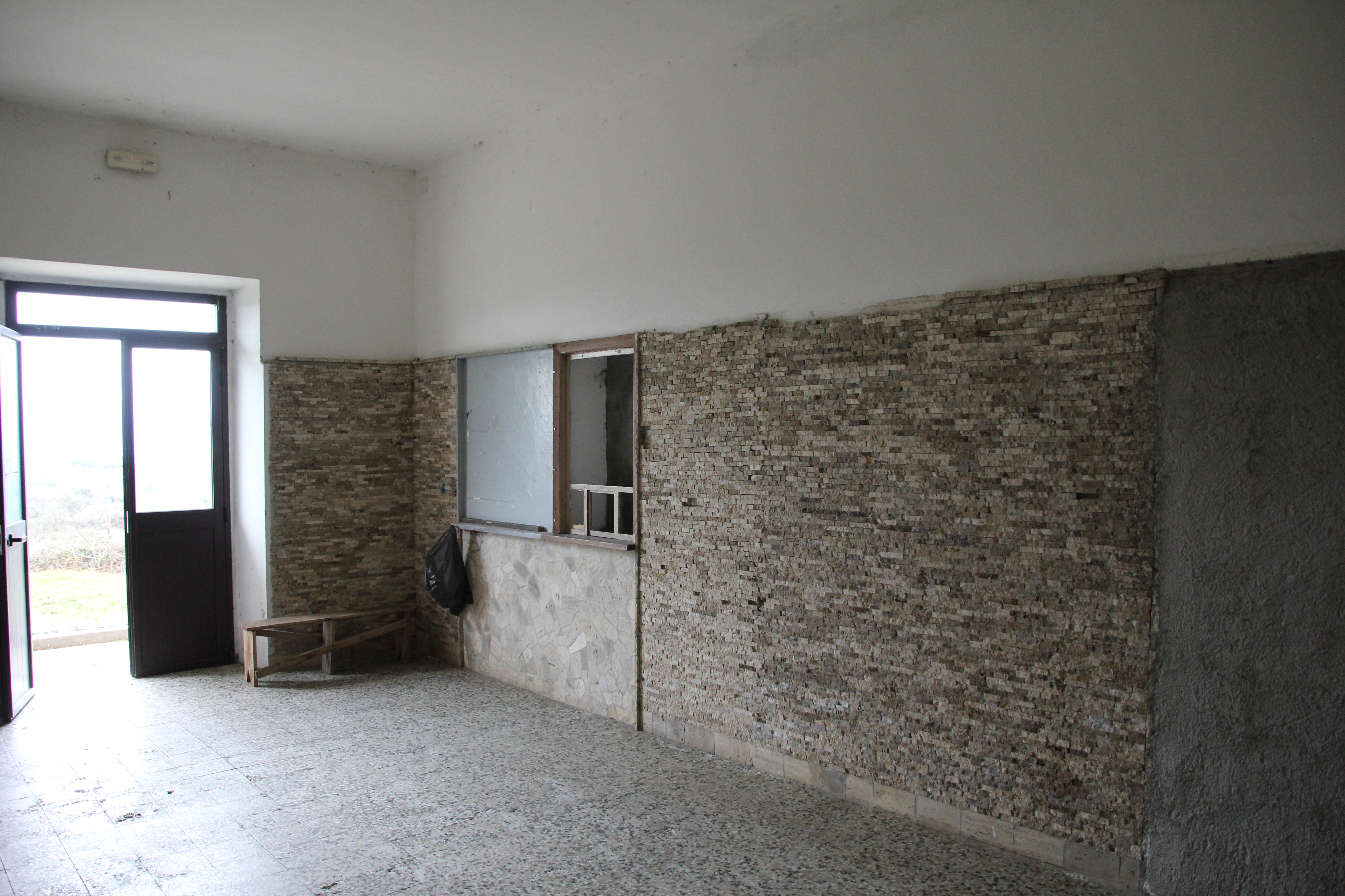 Lei, stazione ferroviaria